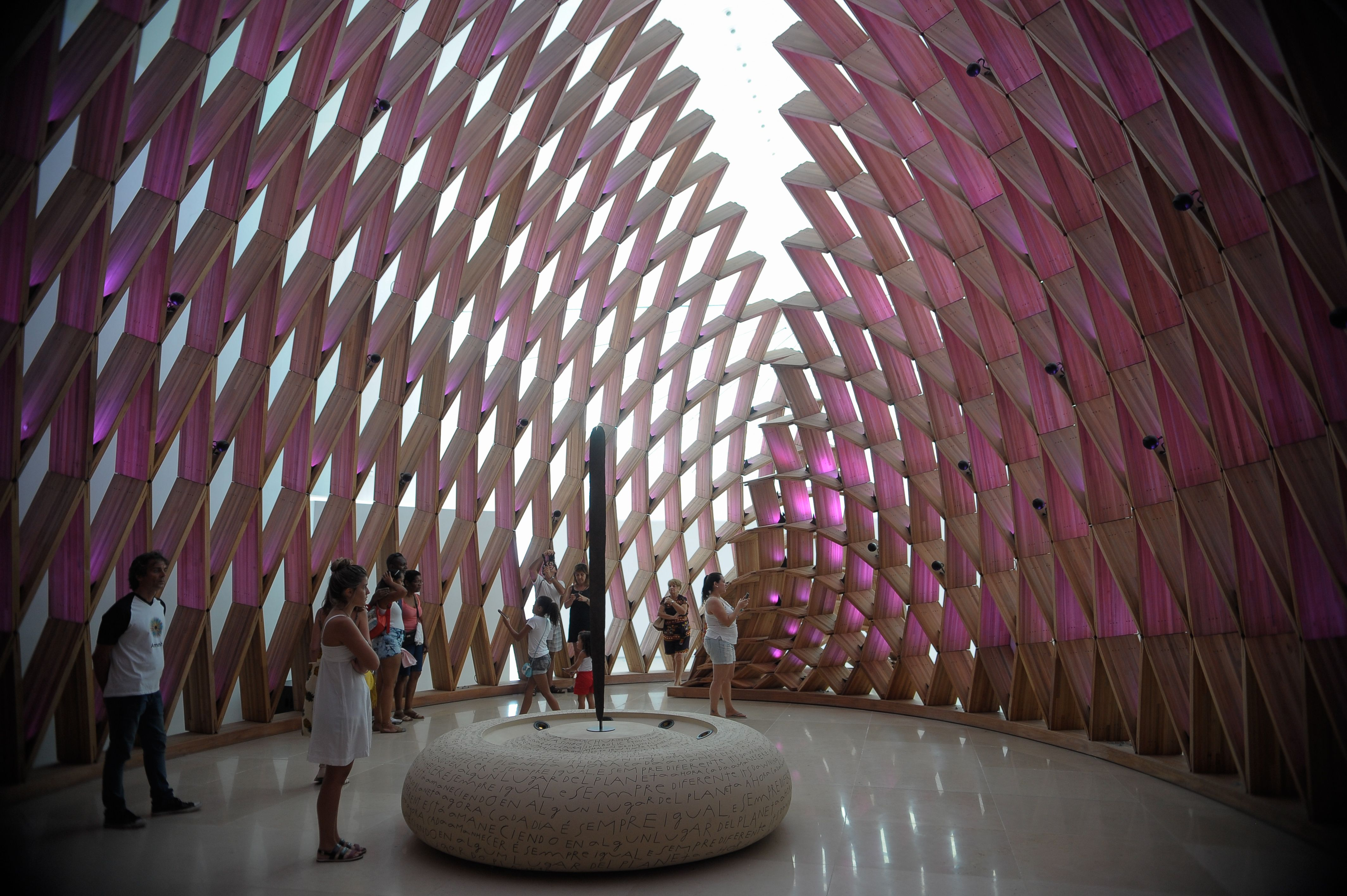 Rio de Janeiro - Para celebrar a inauguração do Museu do Amanhã, na Praça Mauá, aberto pela primeira vez ao público neste fim de semana, a Prefeitura do Rio realiza o Viradão do Amanhã